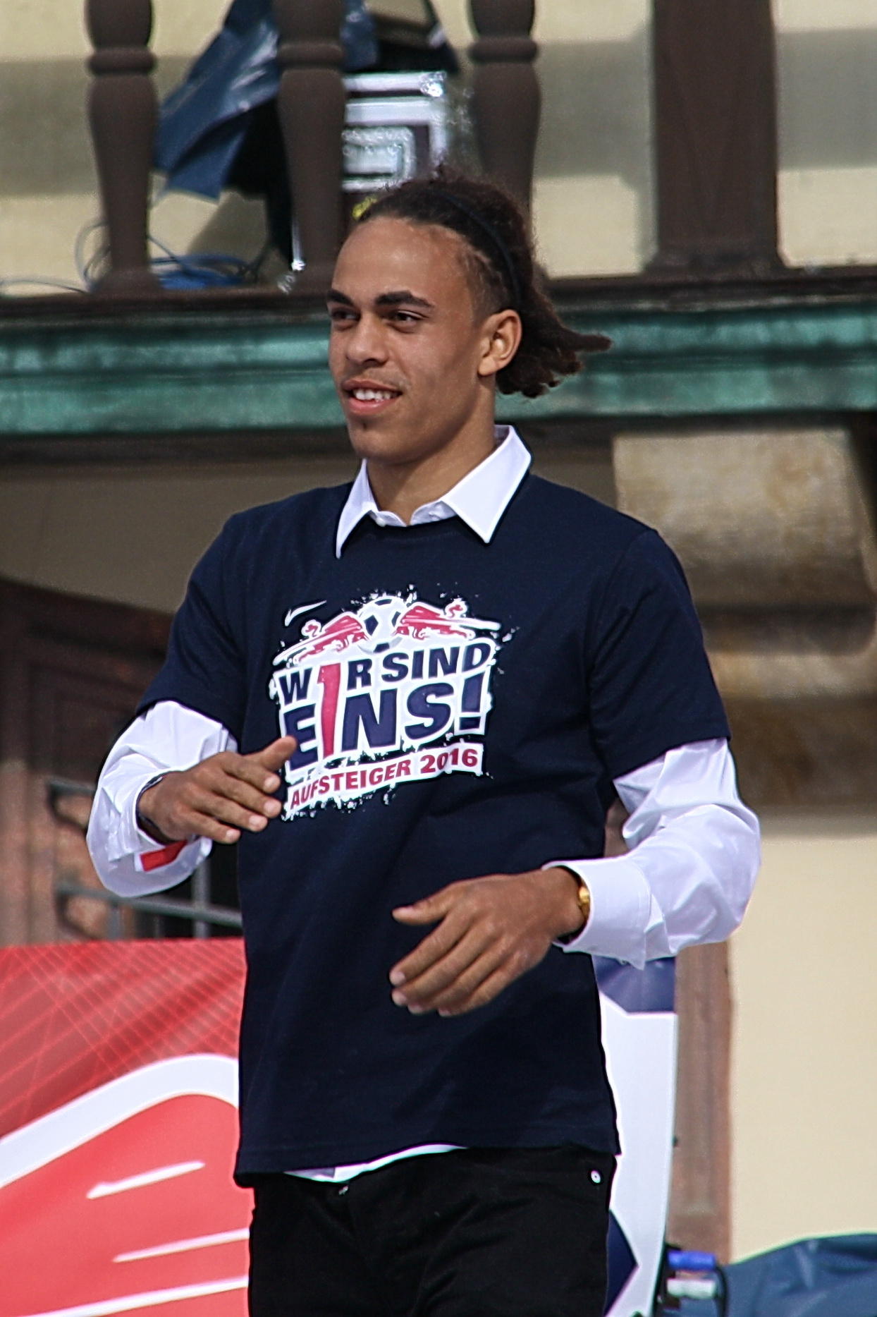 Yussuf Poulsen bei der Aufstiegsfeier RB Leipzig 2016